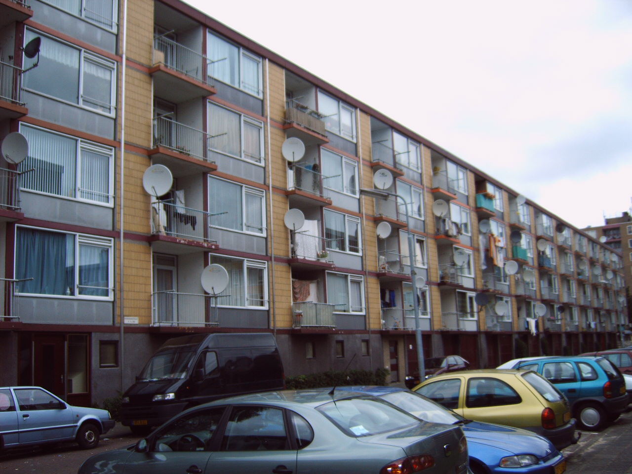 Schotelcity als symbool voor de multiculturele samenleving, kan ook gebruikt worden voor transnationalisme.